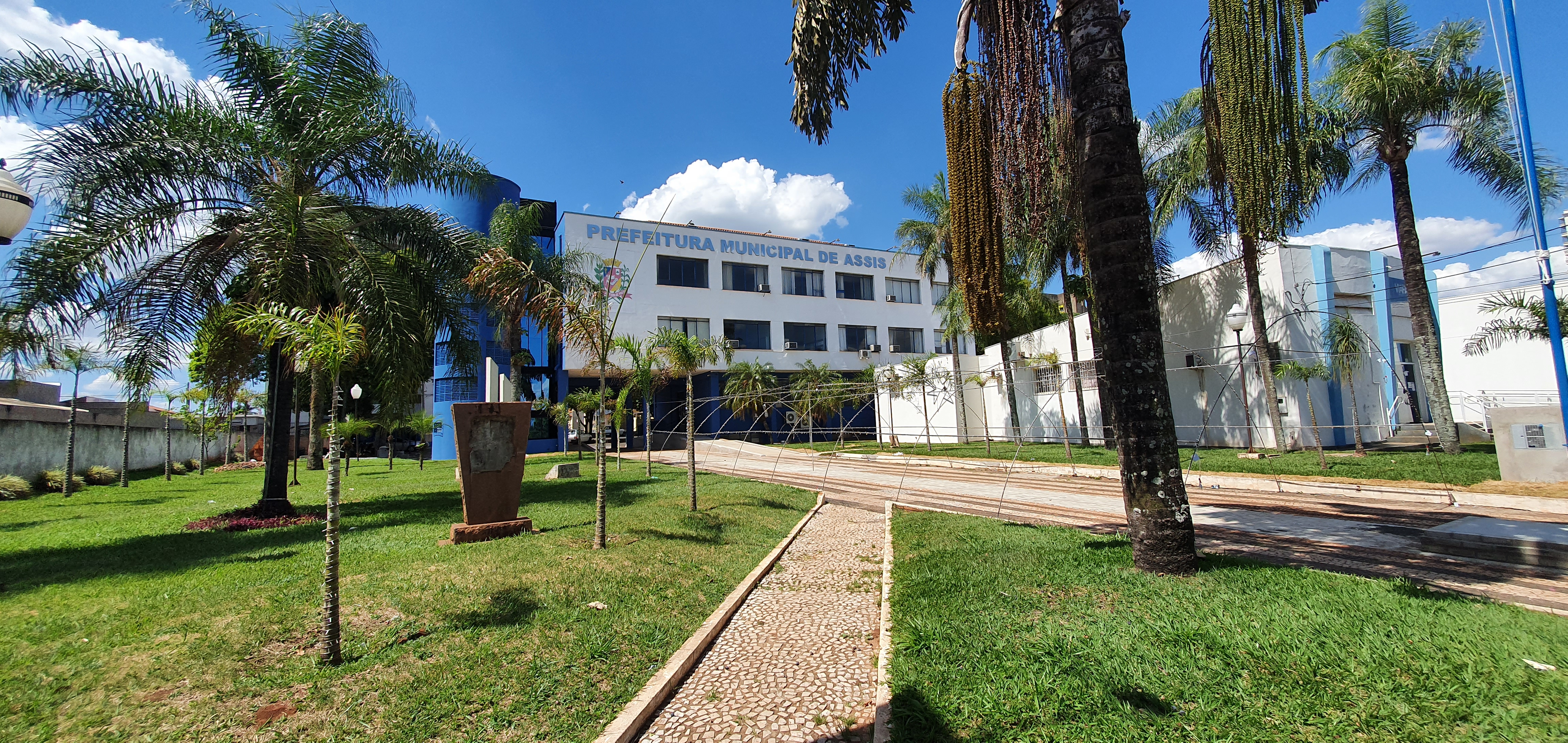 Paço municipal de Assis (SP)